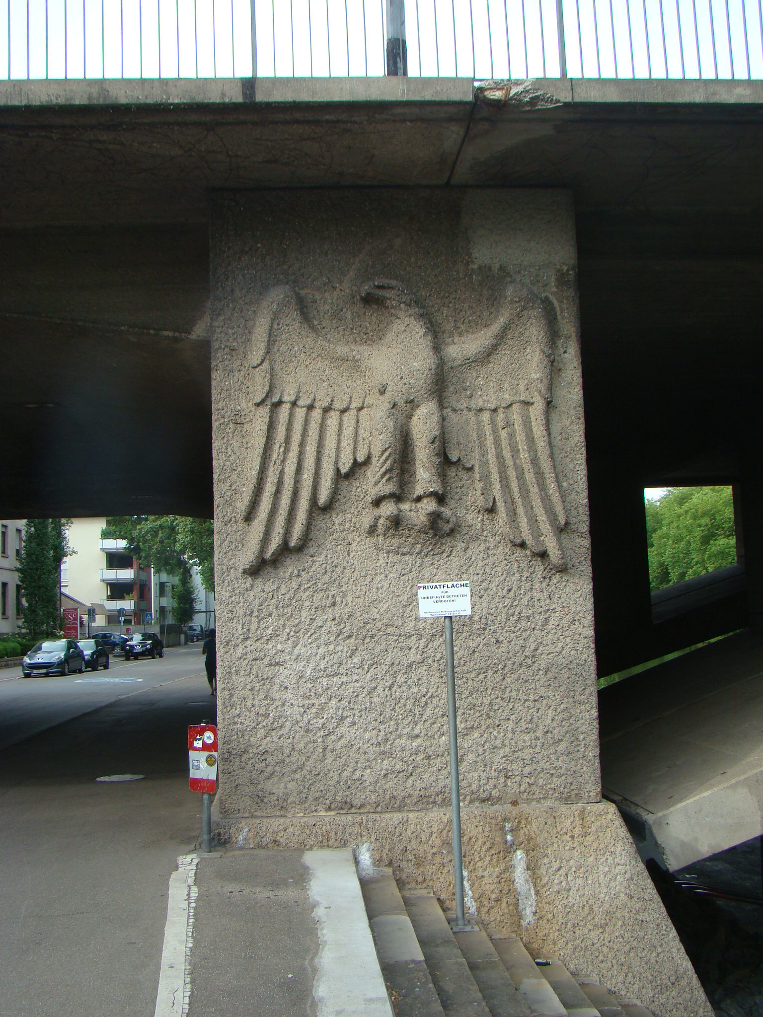 Adler an der Rosenbergbrücke in Heilbronn, Blick in die Badstraße. Der Adler stammt aus dem 3. Reich. Nach dem Krieg wurde der Kranz und das Hakenkreuz unterhalb des Adlers abgeschlagen.